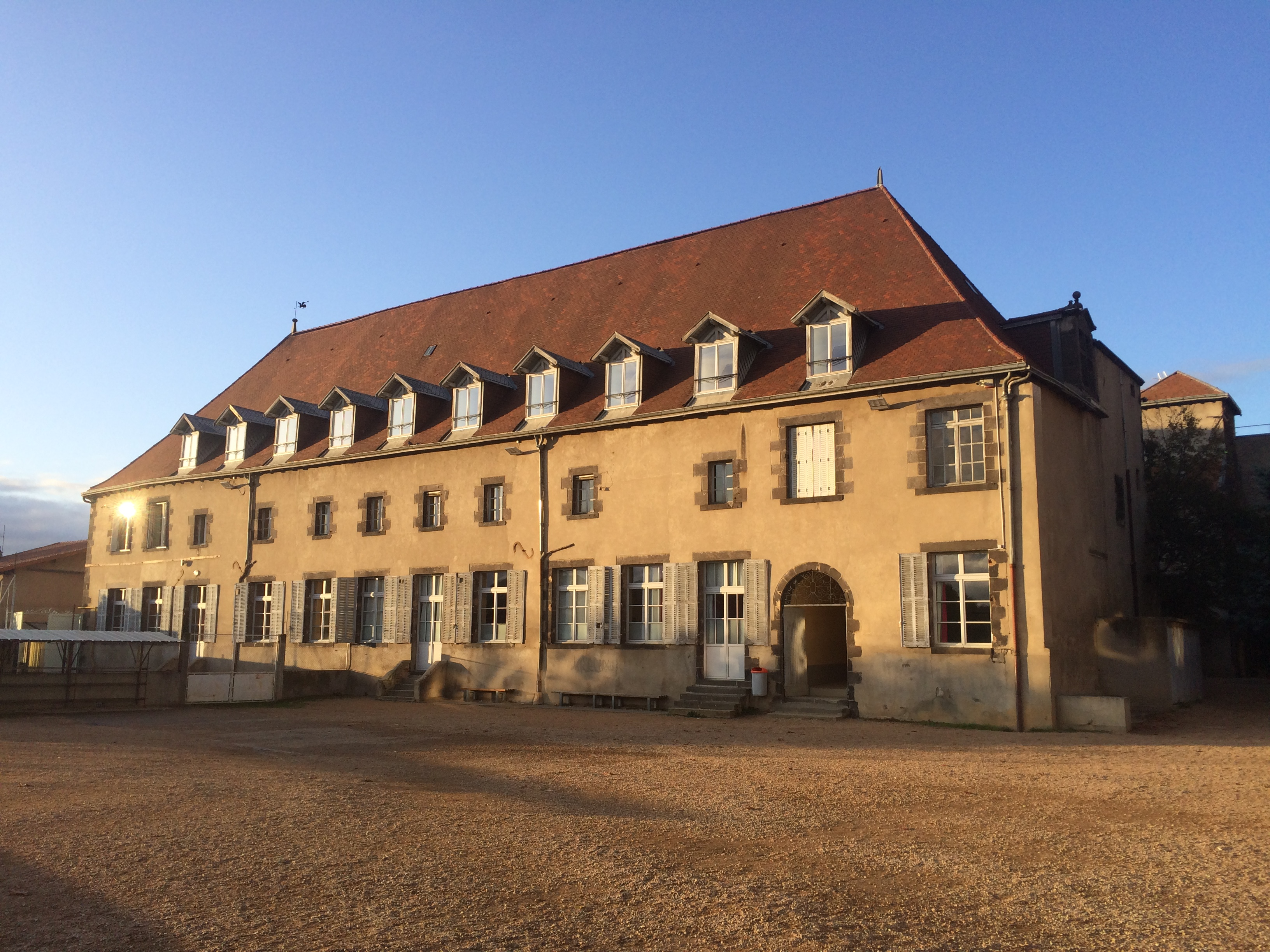 Ancien monastère de la Visitation de Riom, vue de l'aile Sud. Actuellement Institution Sainte-Marie (établissement Mariste).